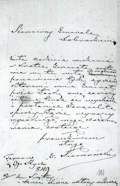 Treść listu: "Szanowny Generale Dobrodzieju Miła nadzieja widzenia wkrótce Generała zostawia mi te miłą sposobność ponowienia tych życzeń, któremi mnie Generał przez łaskę swą zaszczycił, a teraz że wychodze i posłaniec Izraelita spieszy, łączę wyrazy wysokiego, mego uszanowania, zostając Prawdziwem Sługą G. Siemoński Tarnów 3go stycznia 849 Me siostry i dzieci śliczne ukłony mieszczą"